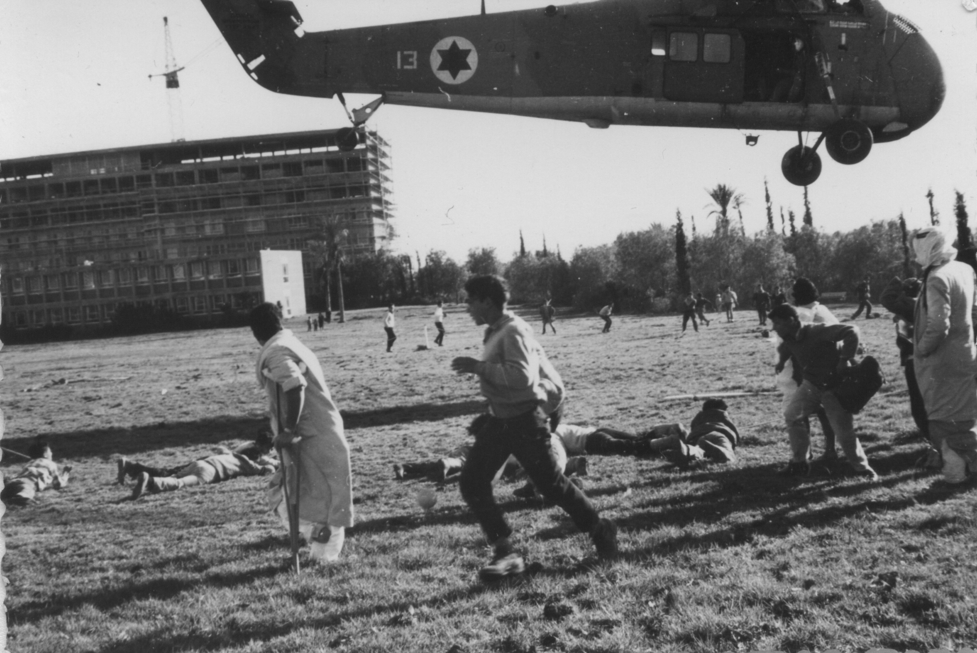 פינוי פצועים לסורוקה